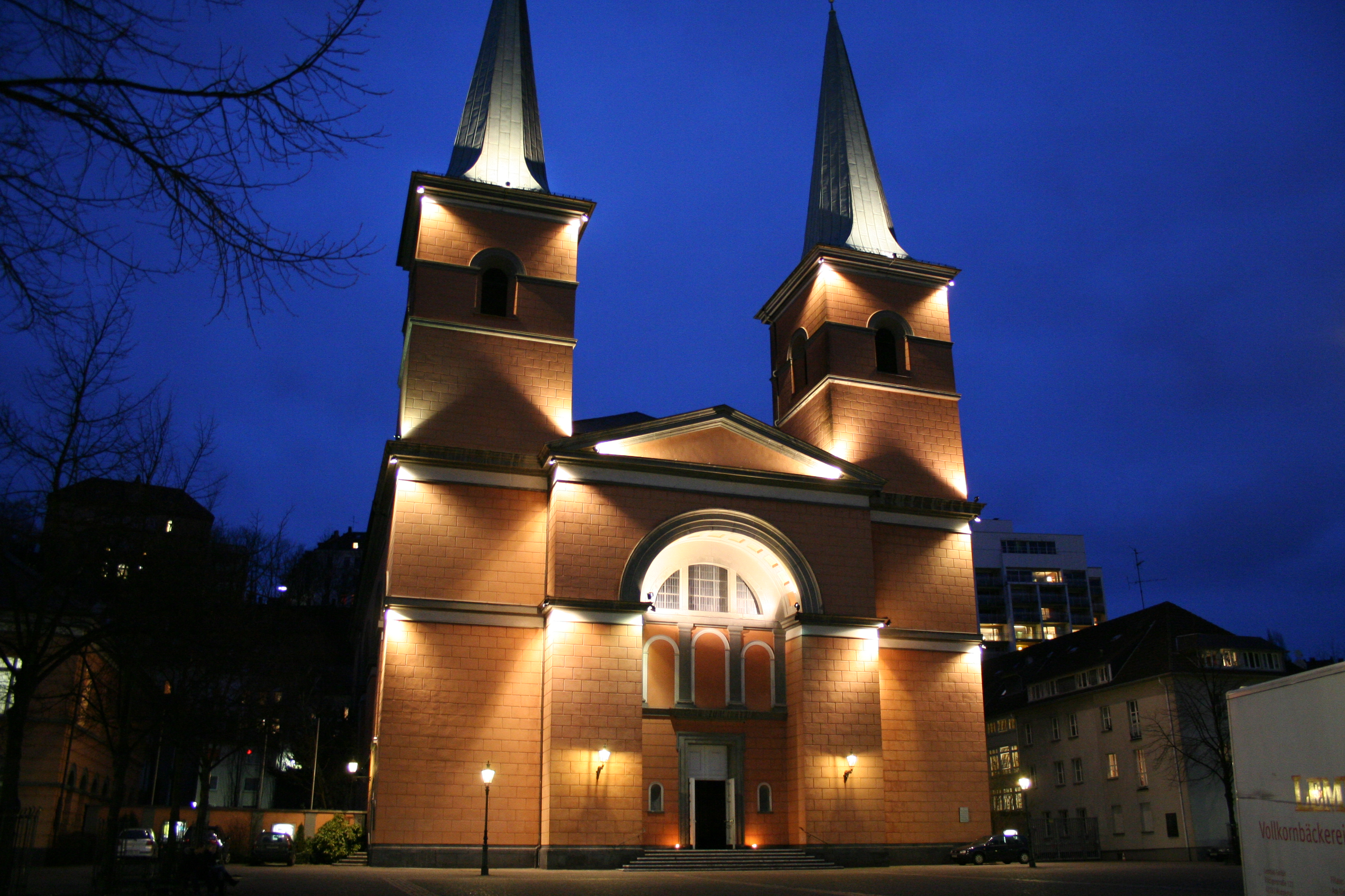 Beschreibung: Laurentiuskirche in Wuppertal Quelle: Selbst erstellt Datum: 23.Februar 2006/ 22.Februar 2007 Autor: Thomas Kathöfer